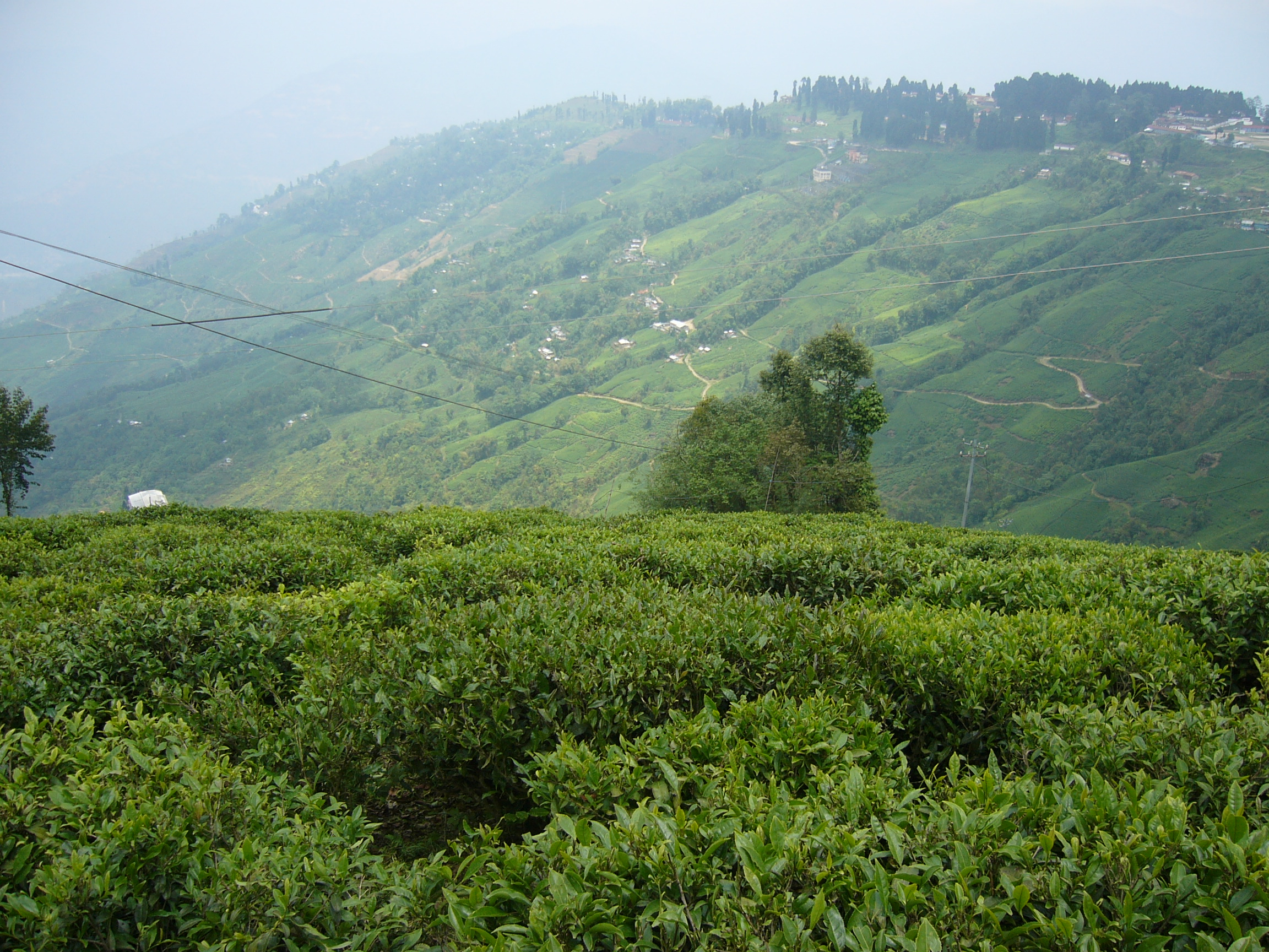 Tea Garden Darjeeling West Bengal India